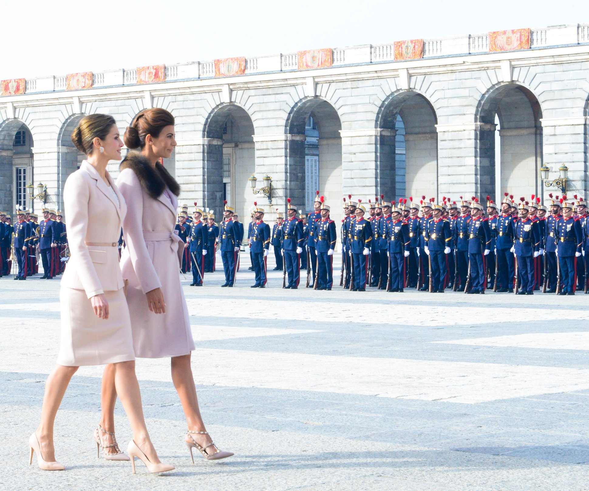 La primera dama Juliana Awada y la reina consorte de España, Letizia Ortiz dialogaron sobre los lazos que unen a ambos países y coincidieron en la importancia de trabajar en el cuidado de la niñez y el desarrollo integral de las mujeres.